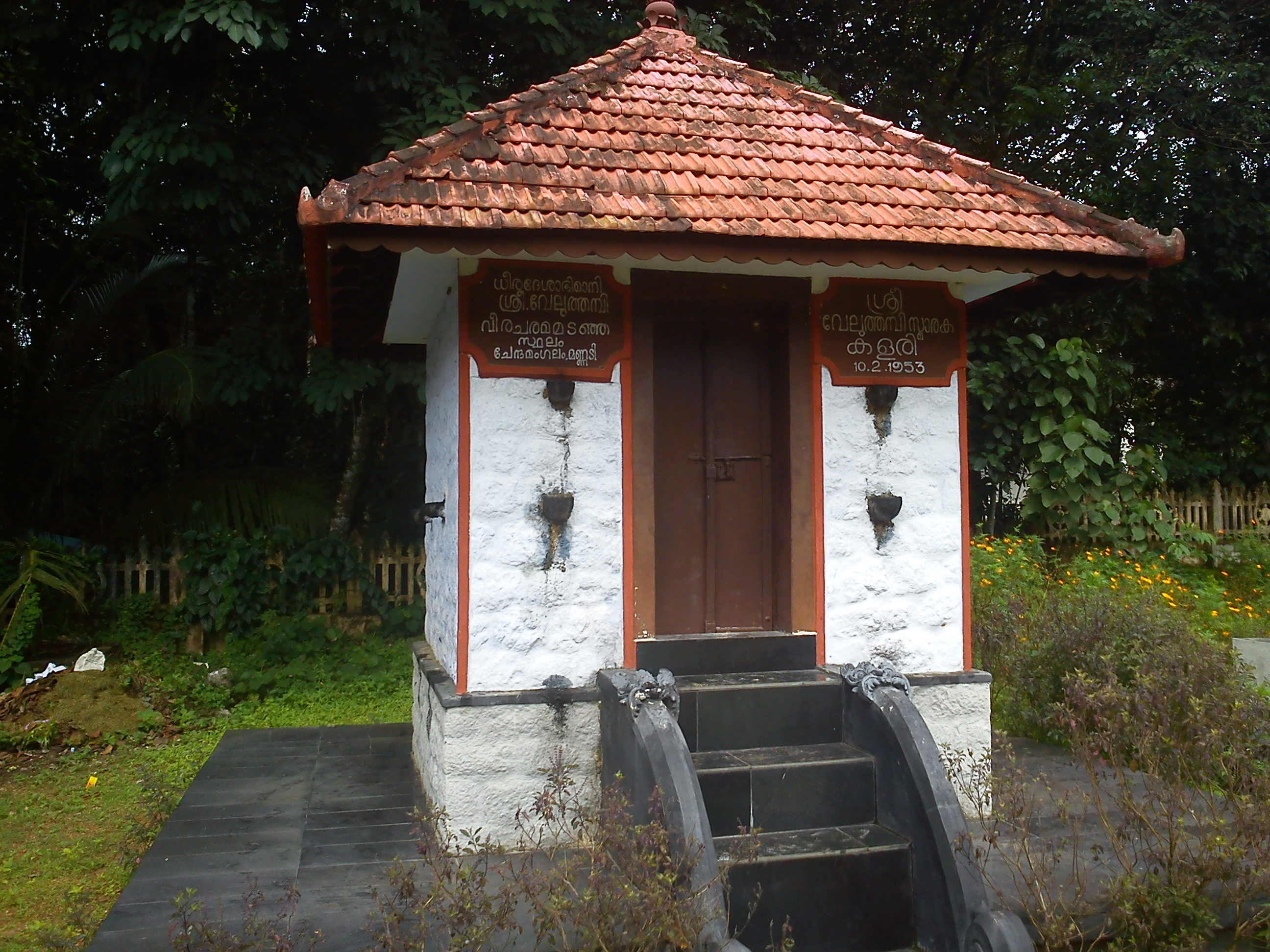 വേലുത്തമ്പി ദളവ ആത്മഹത്യ ചെയ്തിടത്തെ ക്ഷേത്രം(മണ്ണടി)‌